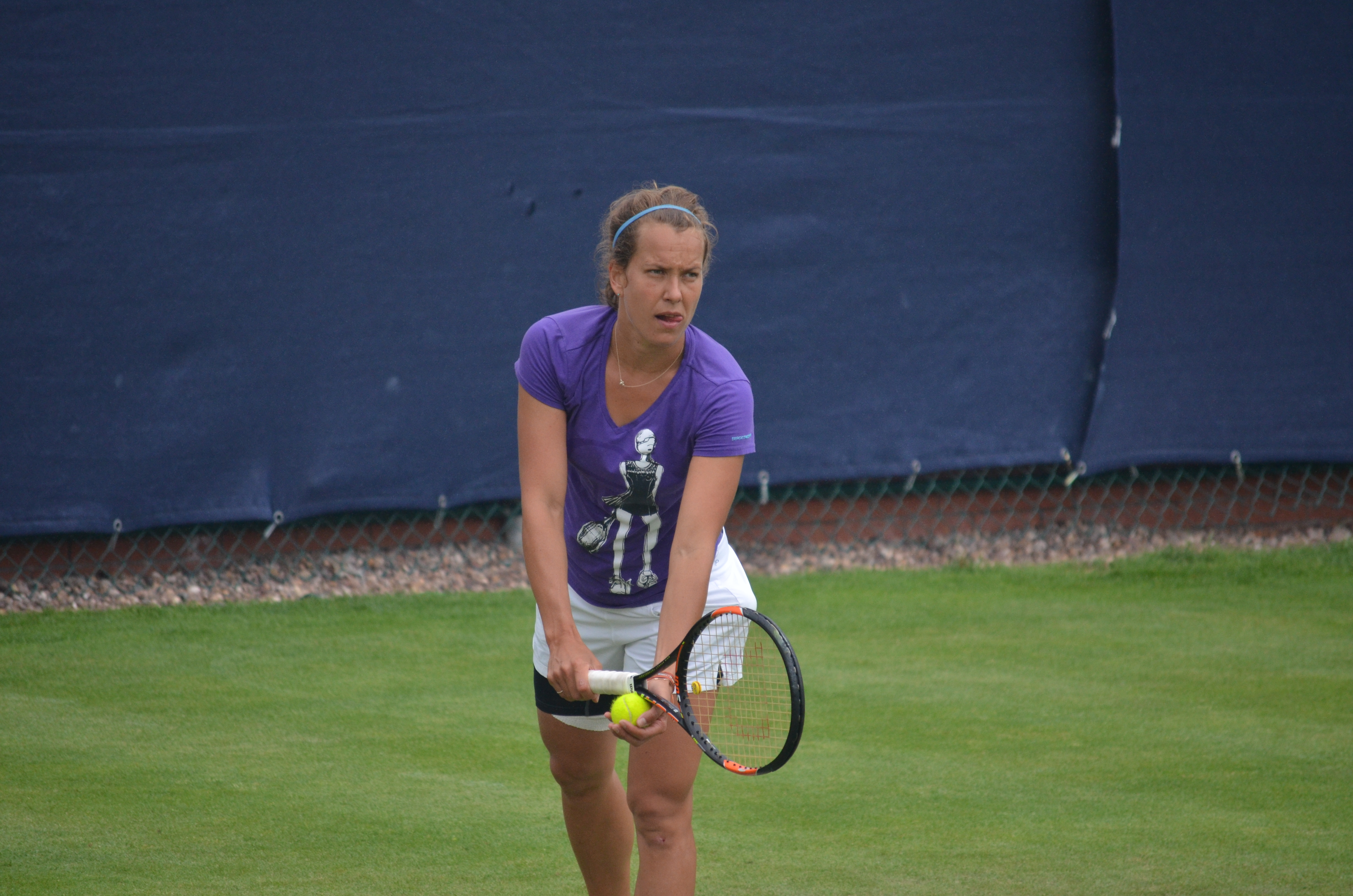 Barbora Strycova